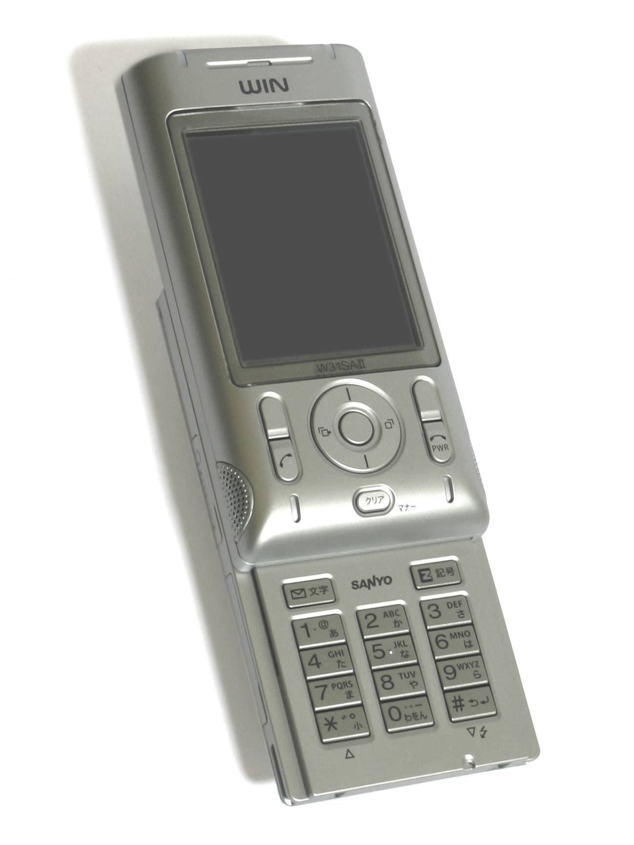 au CDMA 1X WIN W31SAII is a mobile phone.